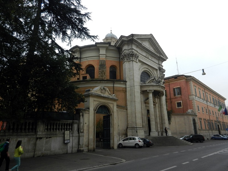 Roma - Chiesa di S. Andrea al Quirinale